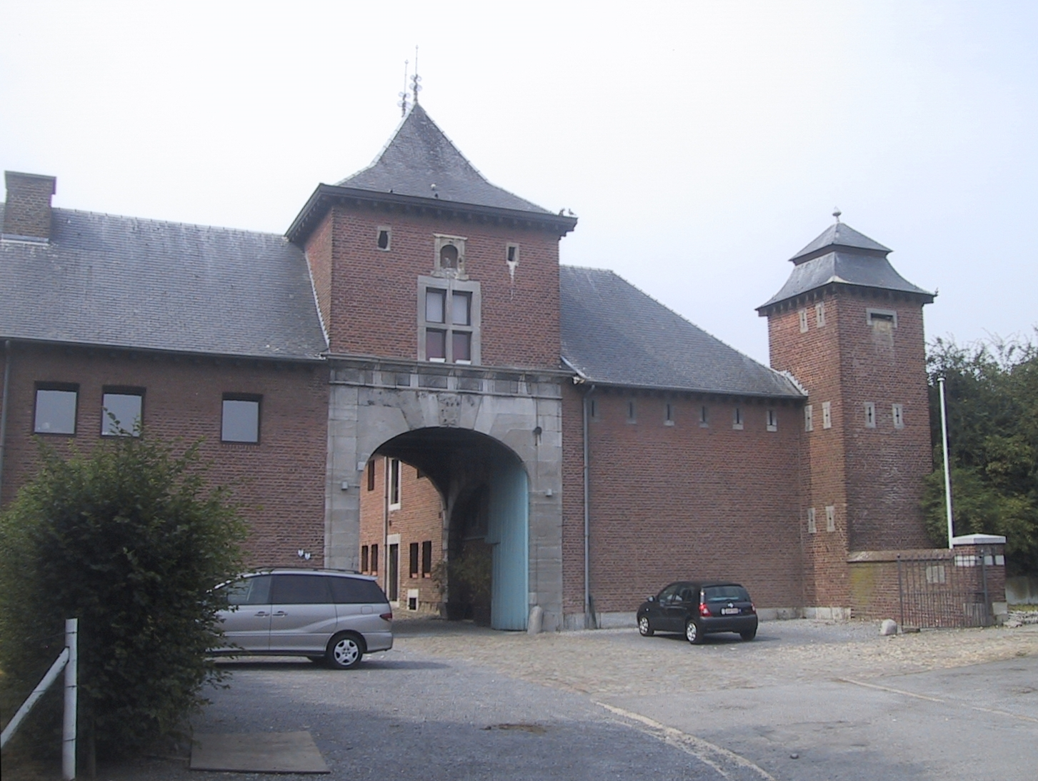 Château-Ferme des Hombroux à Alleur en Belgique